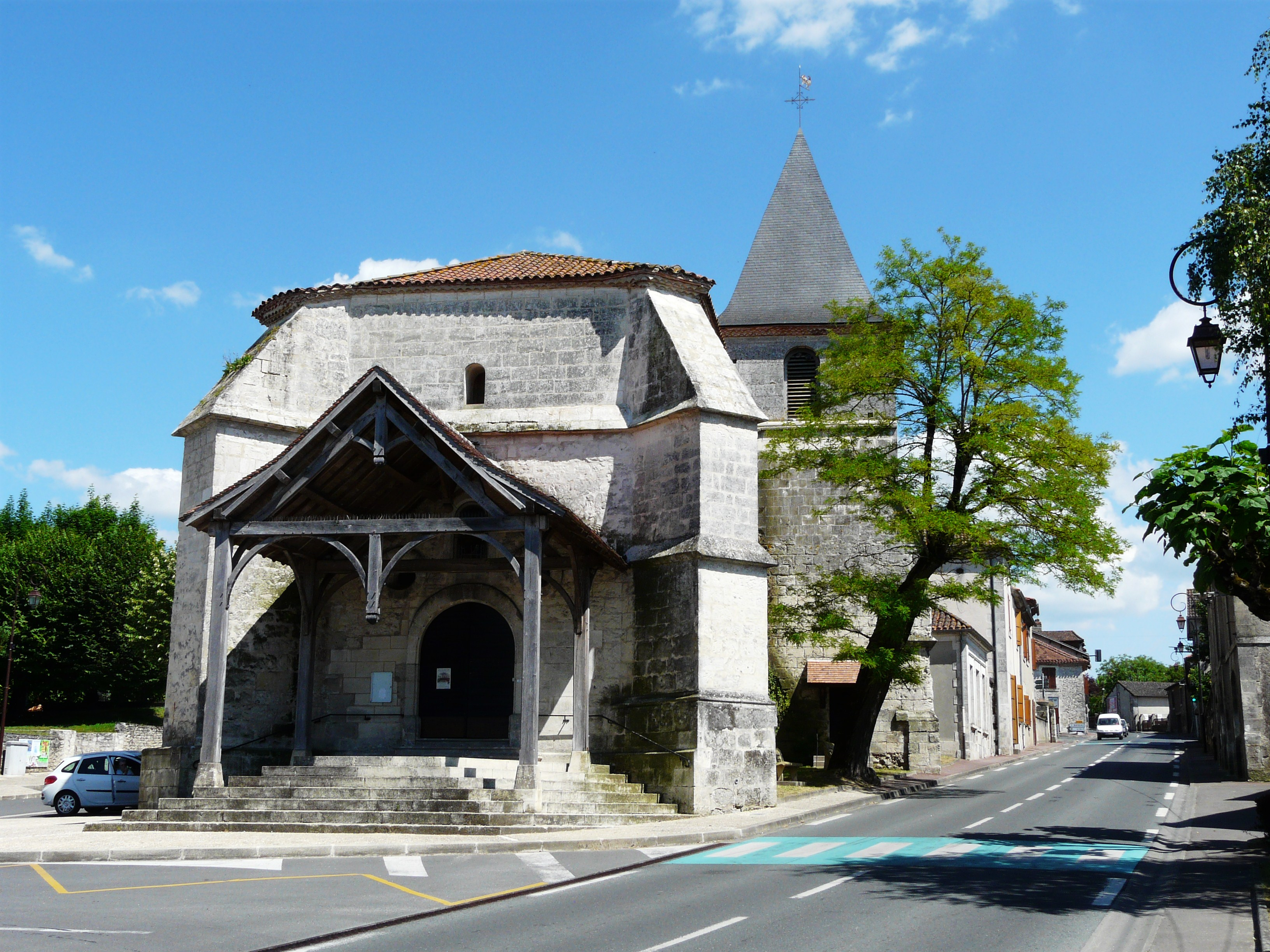 L'église Saint-Pierre et Saint-Paul, Mensignac, Dordogne,France